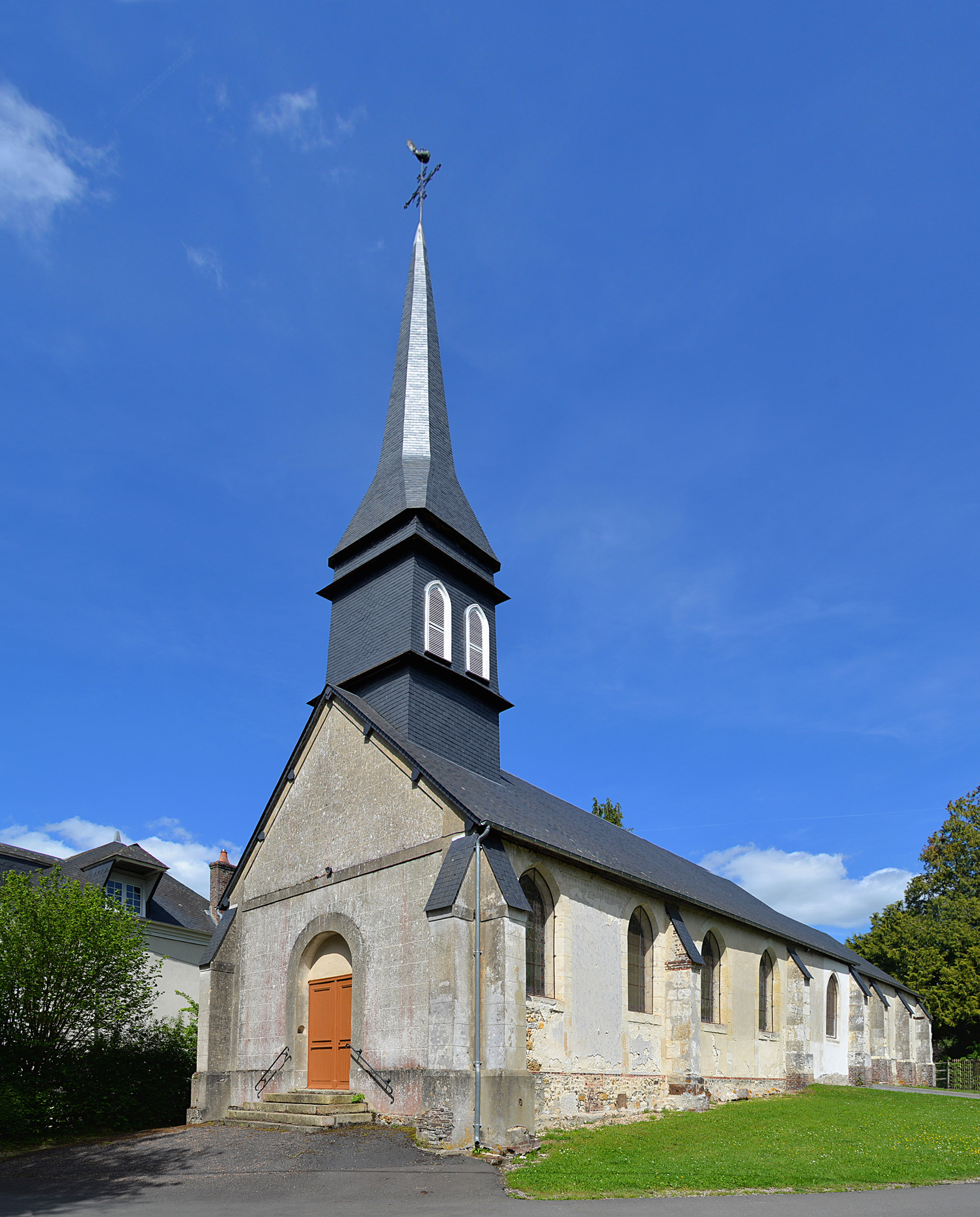 Saint-Julien-de-Mailloc (Valorbiquet Calvados)